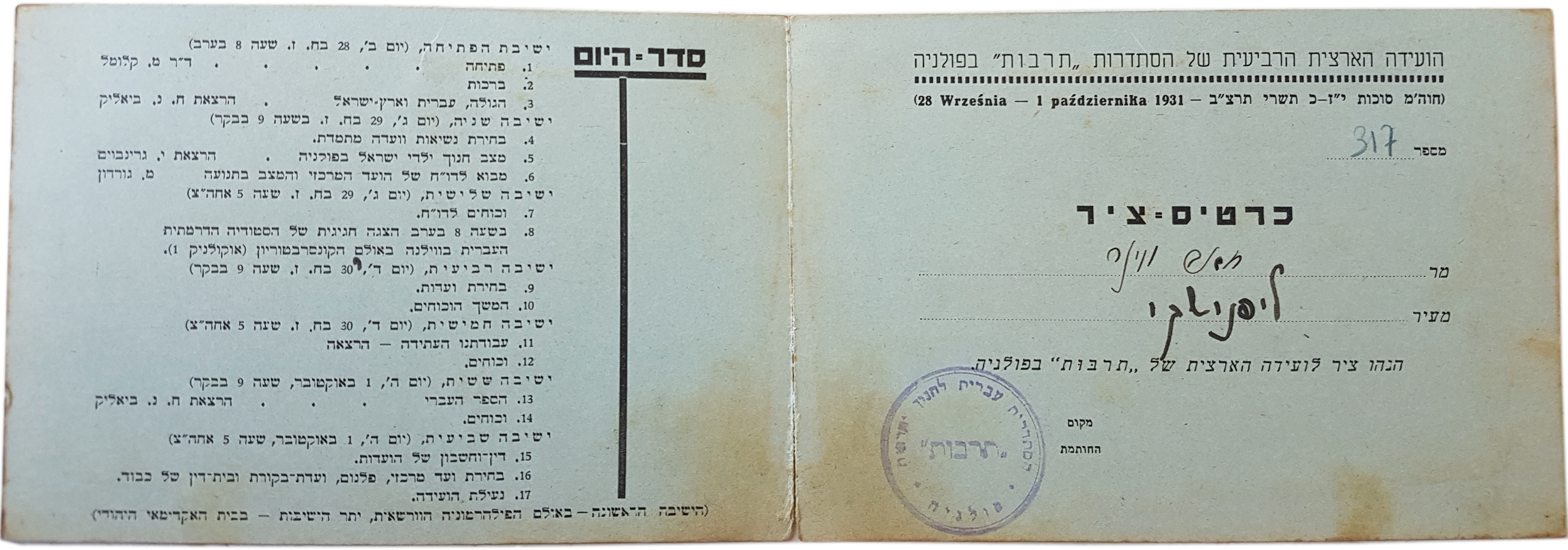 כרטיס ציר של זאב ויינר לועידת תרבות בפולין ב 1931